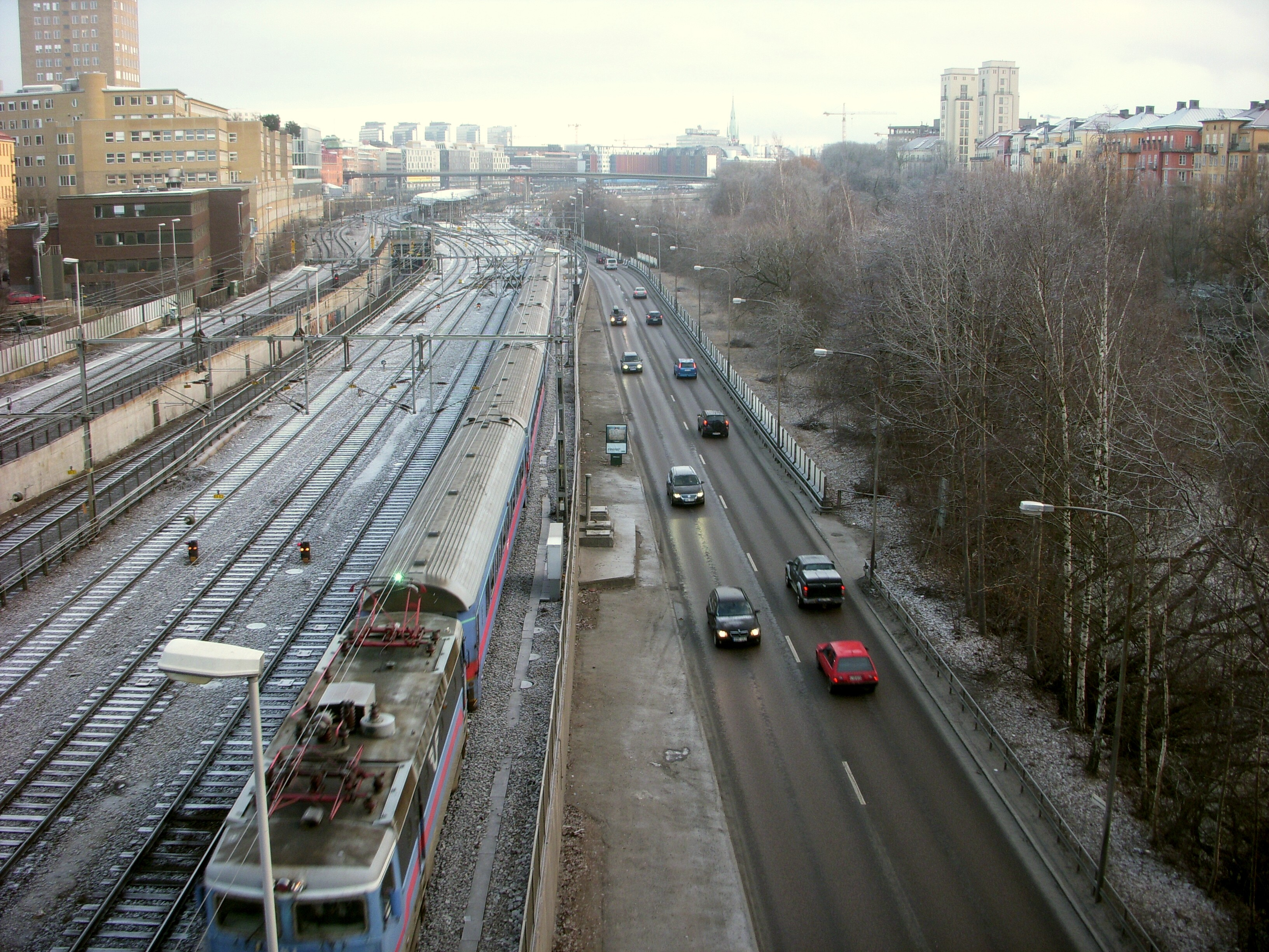 Klarastrandsleden i Stockholm